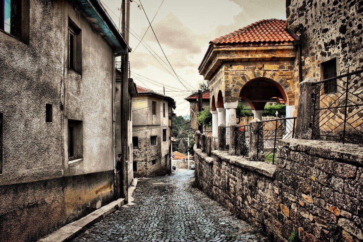 Старият град в Кратово.